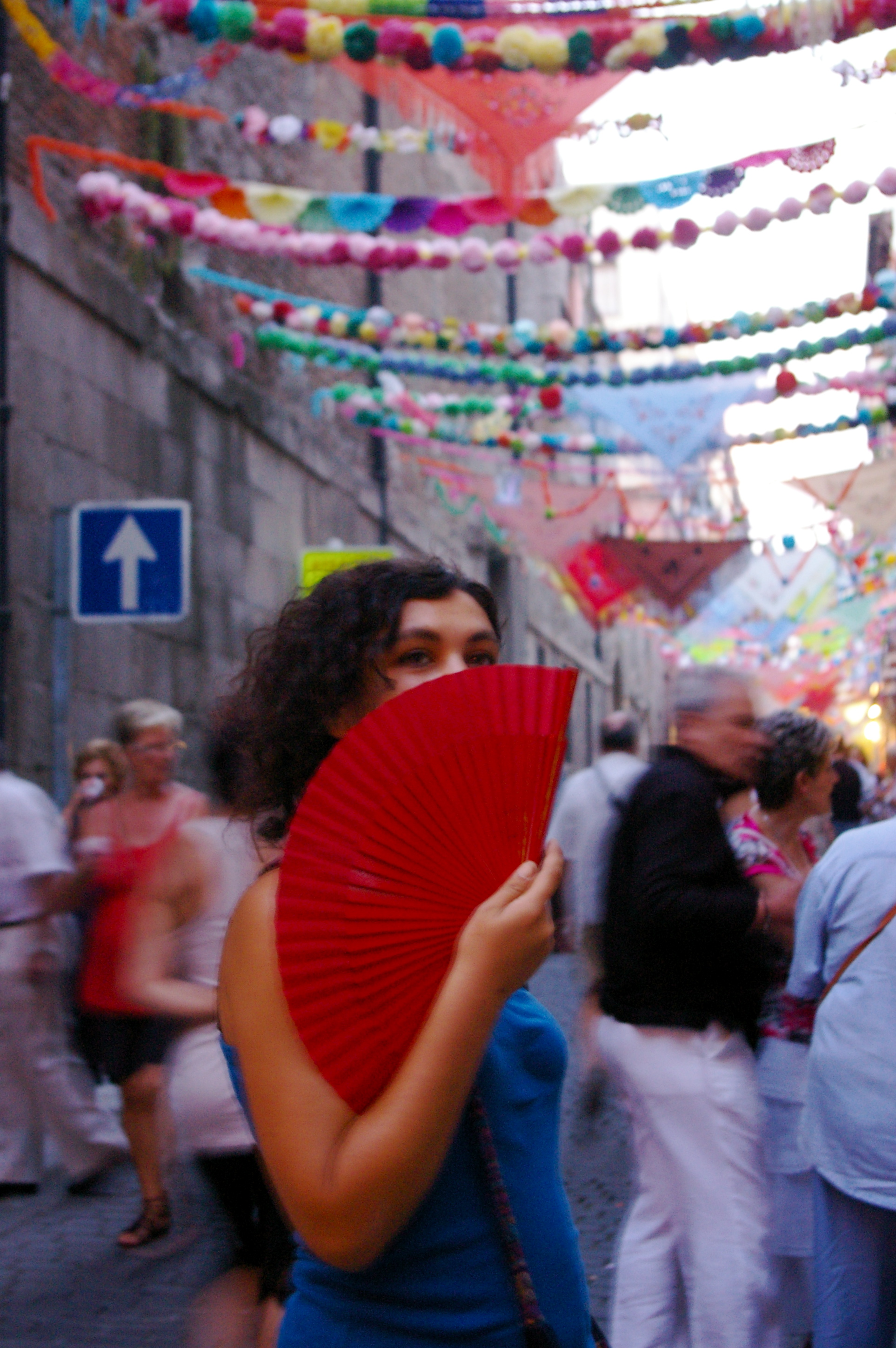 Fiestas autogestionadas por el vecindario (y castizas) en la calle del Oso.